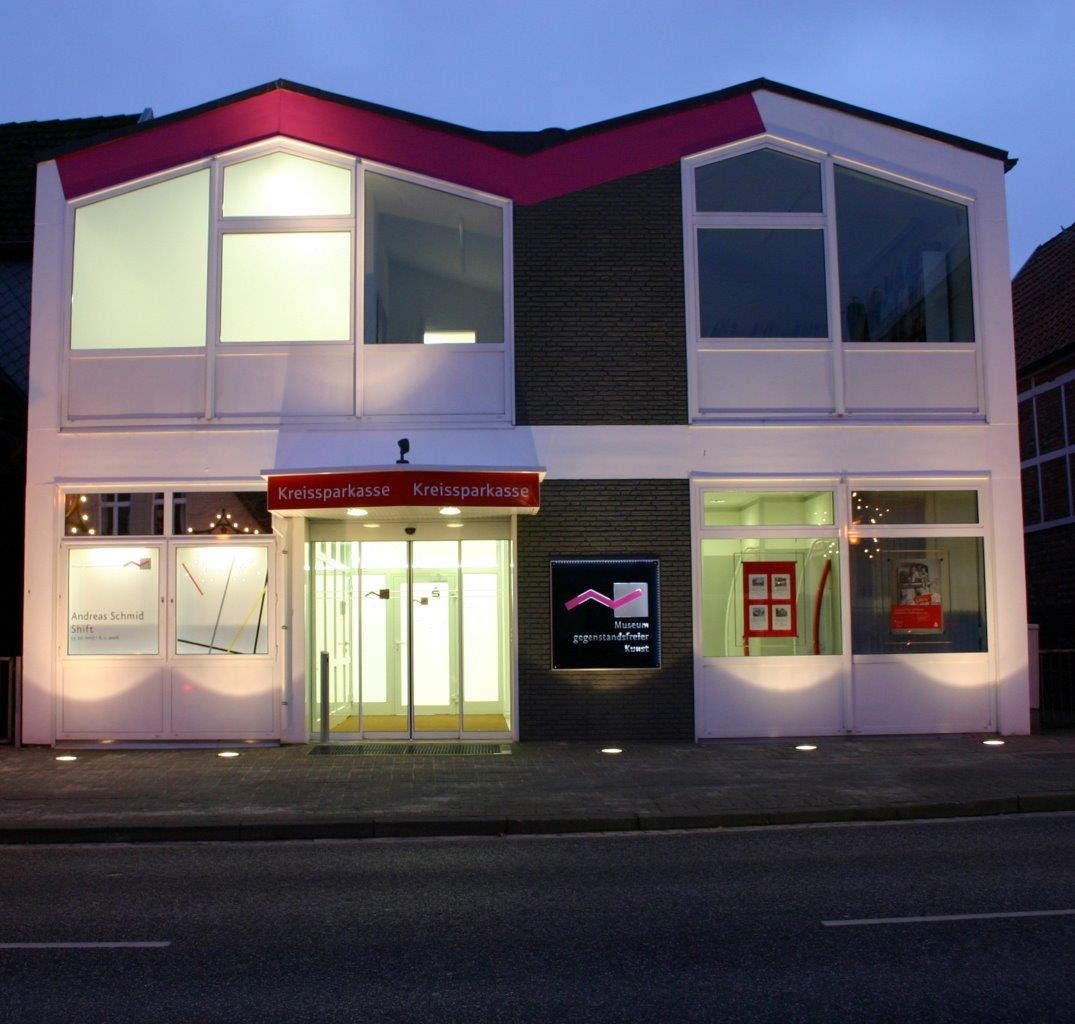 Außenansicht des MgK